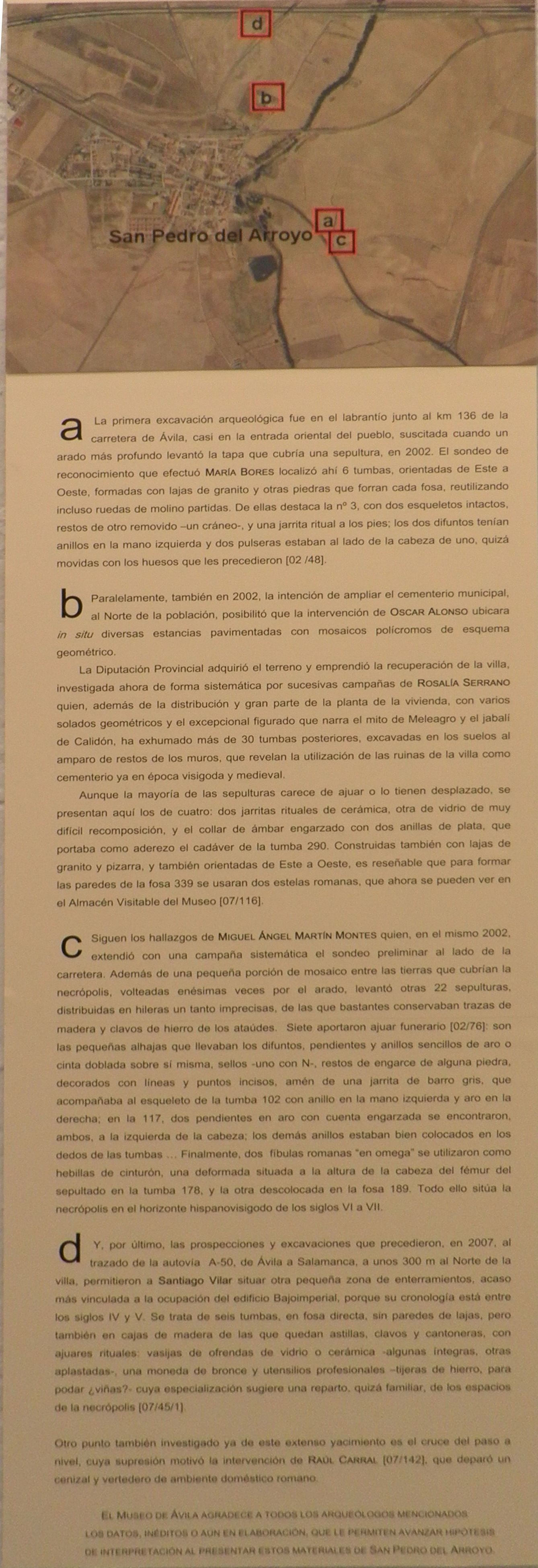 Cartel explicativo de las investigaciones en la villa romana de El Vergel y su entorno